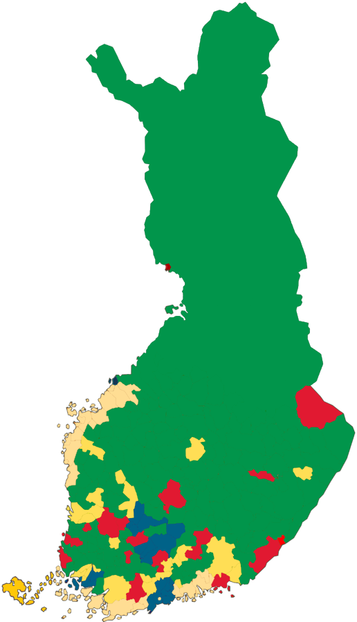 Kunnittain eniten äänestetty puolue.